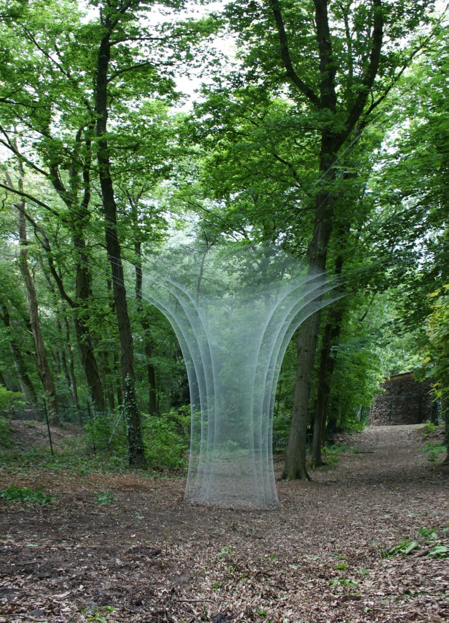 Mediodía se celebra en el Interior 2001. Red de nylon. 5'6 x 4 x 4 m.